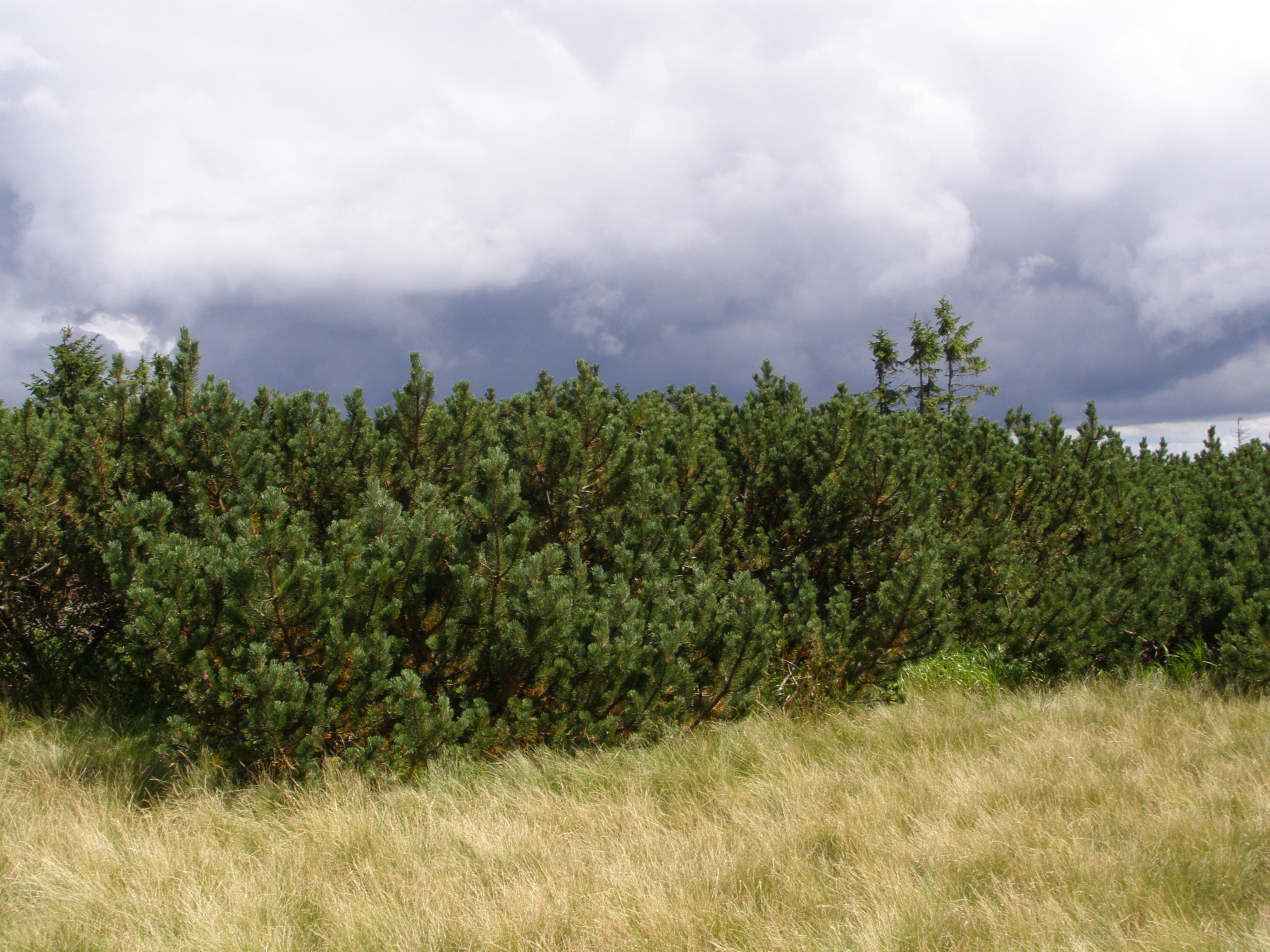 Nízké Tatry, Ďumbierské Tatry, východní úbočí vrcholu Skalka (1549 m)